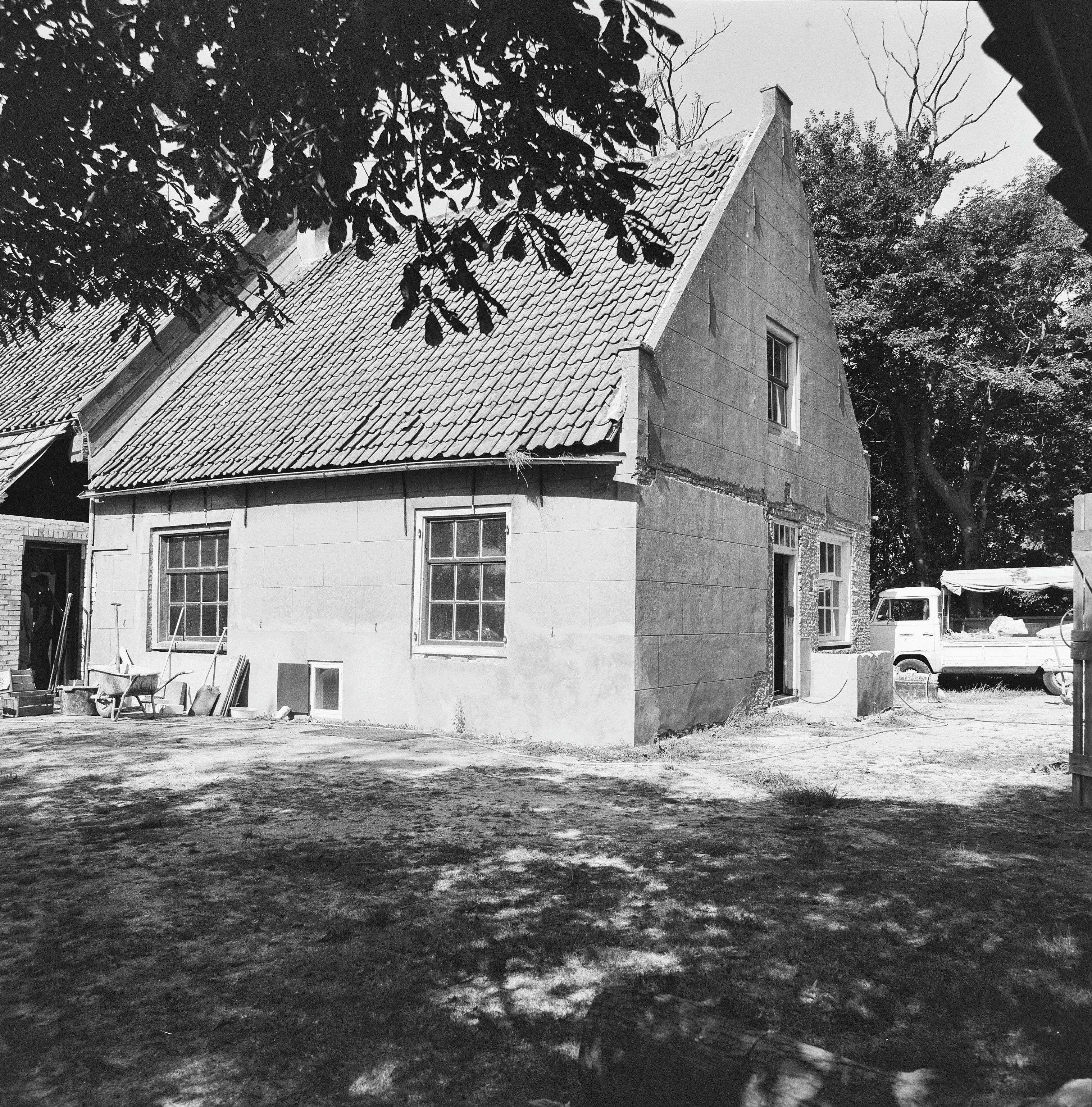 Duivekooi: voor en zijgevel